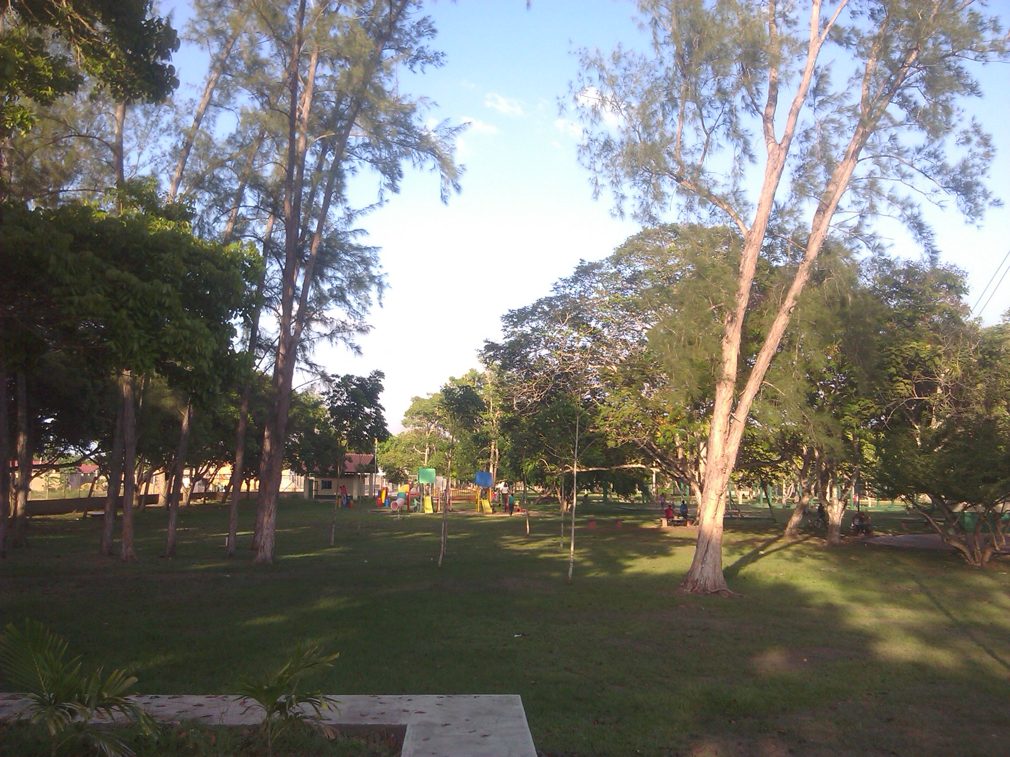 Parque Andres Eloy Blanco, Maturín, Estado Monagas.